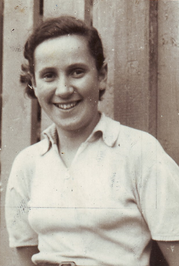 ליזה מאגון